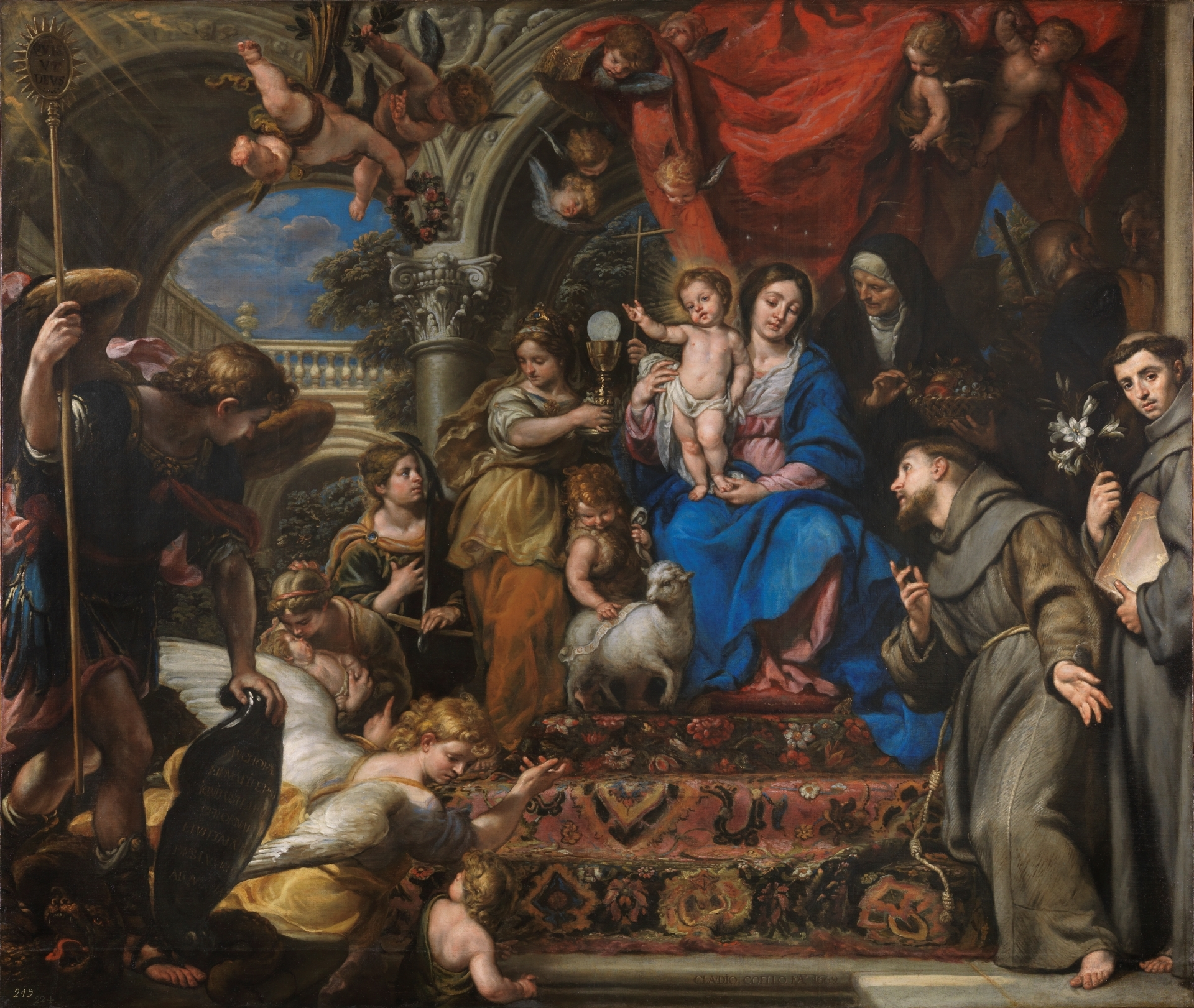 La obra representa a la Virgen María llevando en sus brazos al Niño Jesús y acompañada por representaciones de las Virtudes teologales y de numerosos santos entre los que figuran San Juan Bautista, Santa Isabel de Hungría, San Pablo, San Pedro, San Francisco de Asís y San Antonio de Padua, que se cuentan entre los santos más populares de la España barroca.